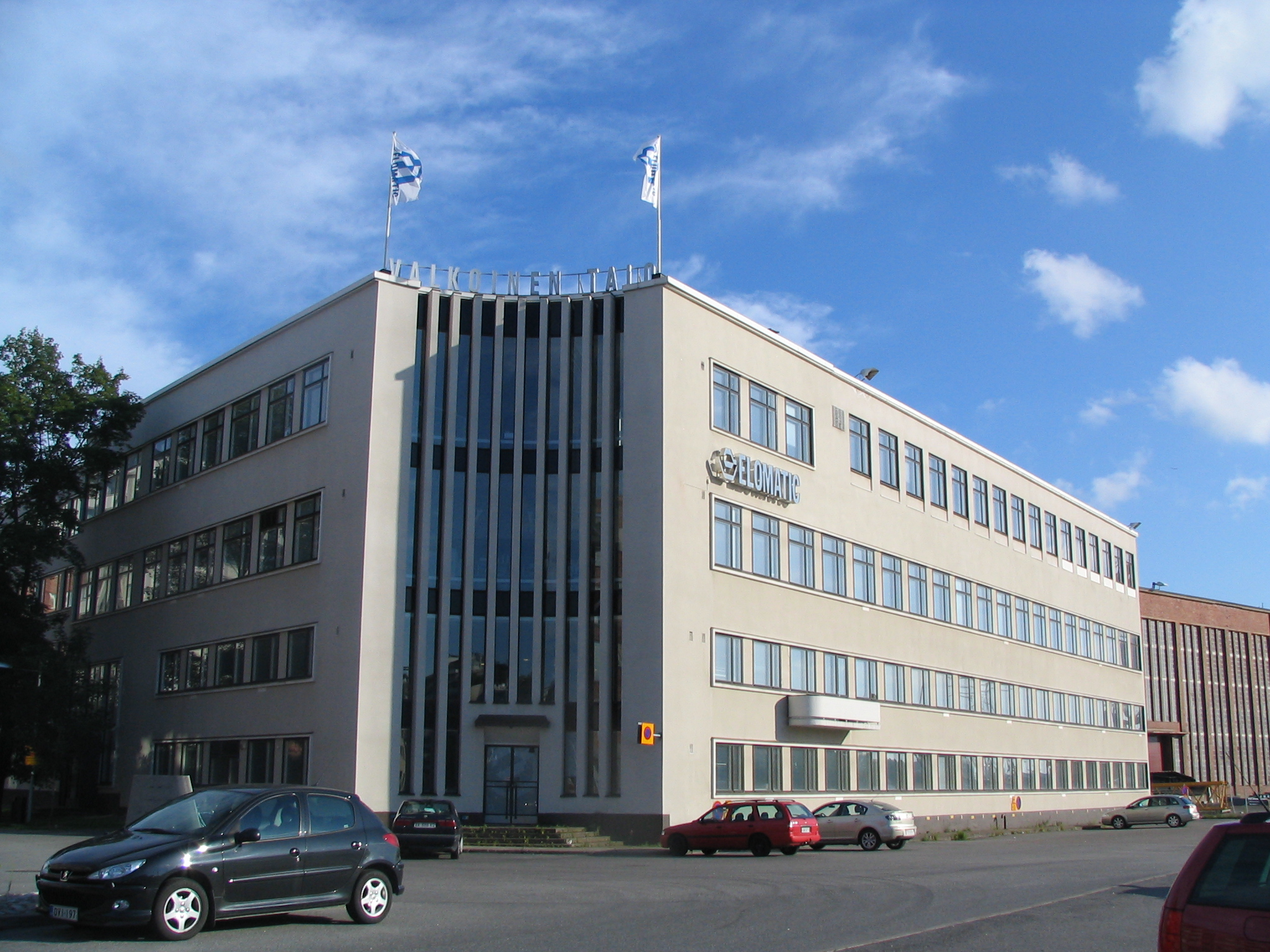 Valkoinen talo Aurajoen rannalla. Rakennuksess sijaitsee Elomaticin pääkonttori. Arkkitehti Gunnar Wahlroos, valmistunut 1937, laajennettu 1951 ja 1958, korotettu 1965. Alun perin Wärtsilän toimistorakennus.